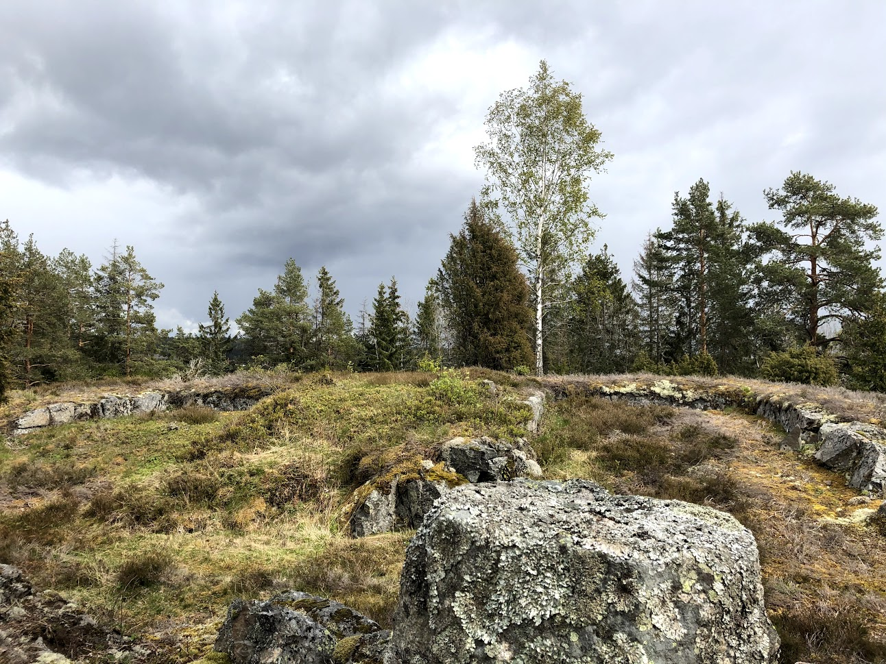 To av standplassene til feltkanonene på den venstre fløyen av batteriet. Bildet er tatt rett bak siktebordet som sees nærmest bildet.